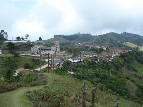 Fotografía del Corregimiento de Pantanillo en Abejorral